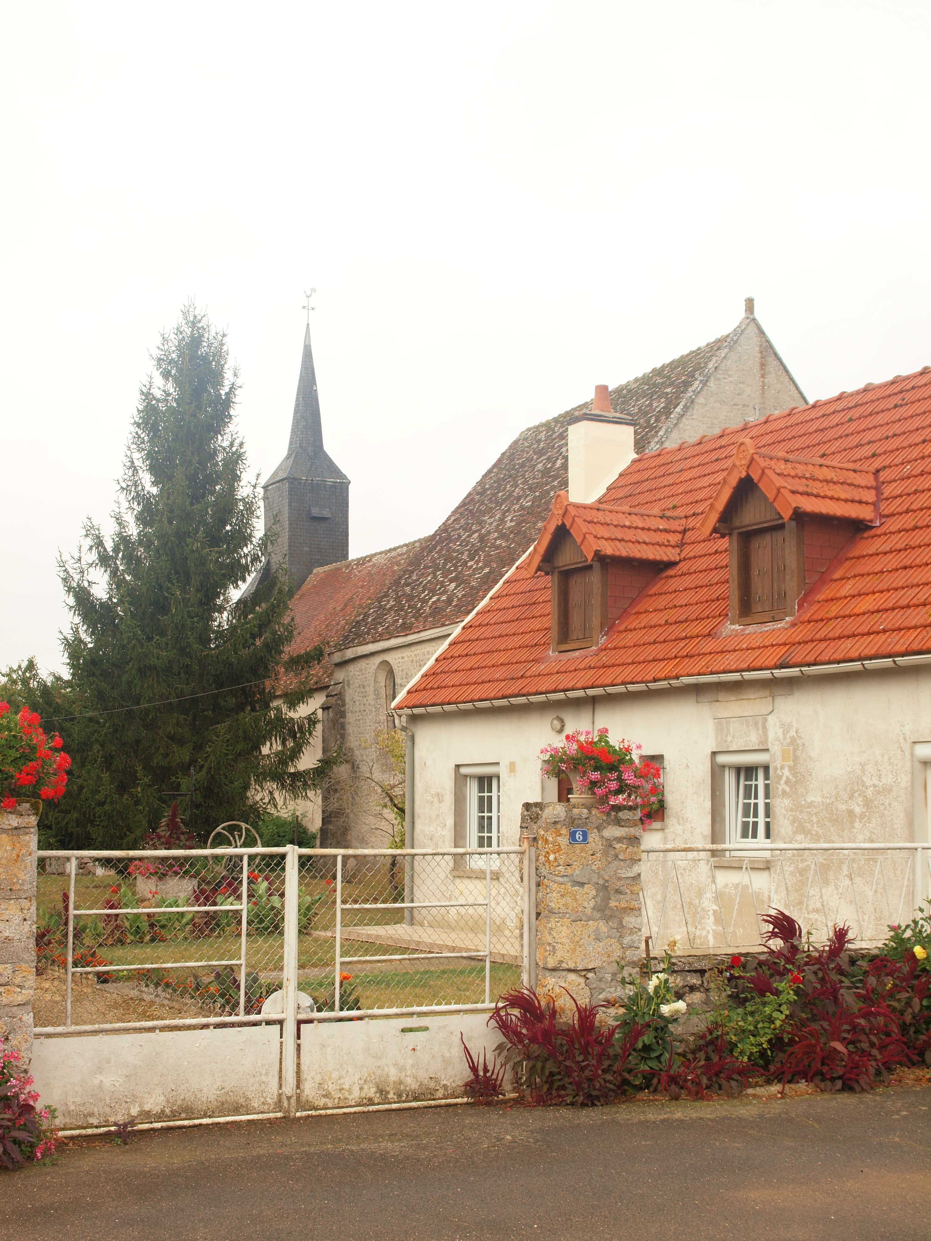 Semerville (Loir-et-Cher, France)